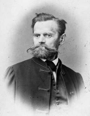 hu/Pákh Albert (1823–1867) újságíró, a Magyar Tudományos Akadémia rendes tagja. Schrecker Ignác felvétele